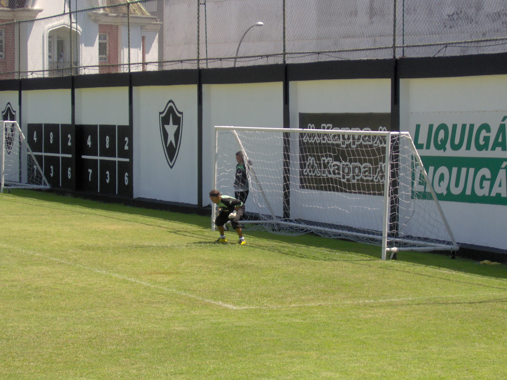 CT João Saldanha do Botafogo FR, no Rio de Janeiro, com Juan Castillo treinando.